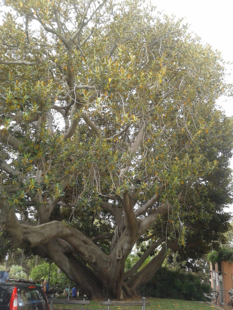 Immagine del Ficus macrophylla che si trova vicino alla Spianata del Capo a Bordighera